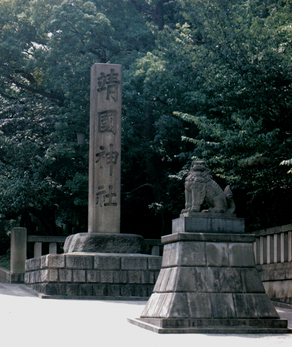 Yasukuni Jinsha Guardin Lion at the gate